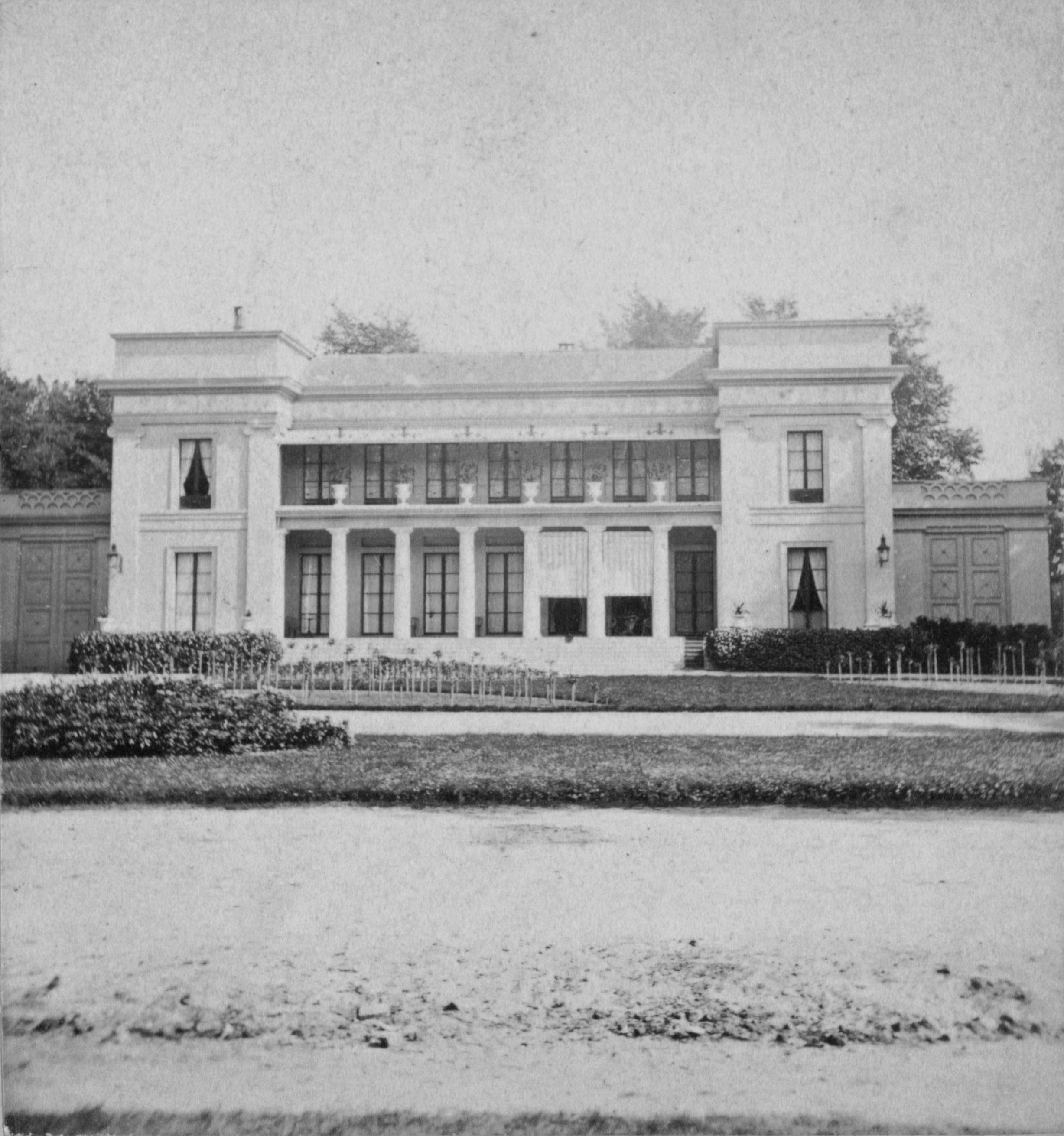 Villa Boschlust, Bezuidenhout, Den Haag. Foto door anonieme fotograaf, circa 1870. Deel van een stereo foto in het bezit van het Rijksmuseum Amsterdam en vrijgegeven als 'Public Domain'.